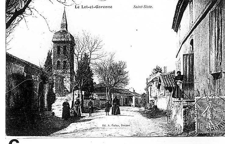 Vue de Saint-Sixte vers 1900